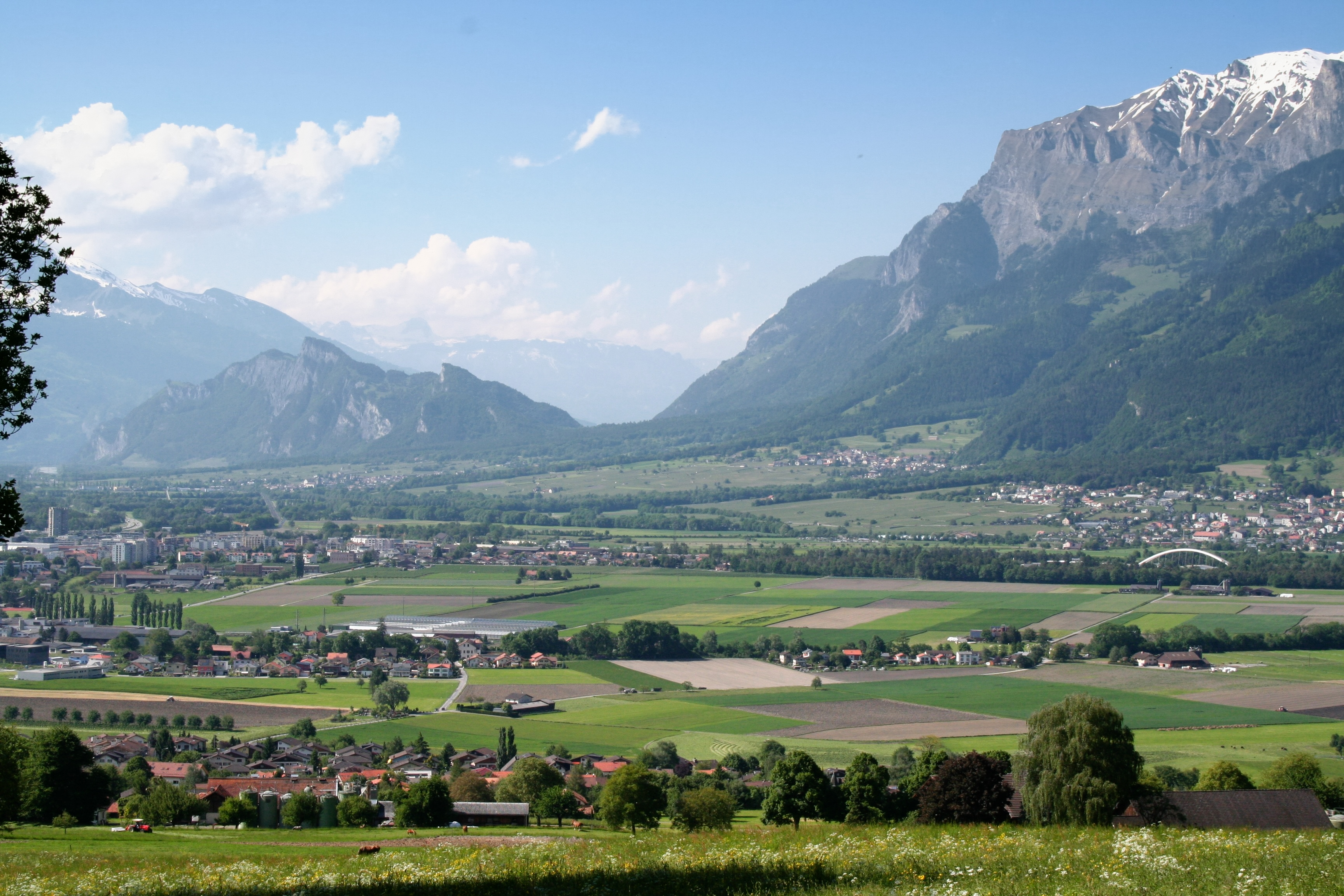 Bündner Herrschaft mit Landquart, Maienfeld, Jenins und Malans (von links). Aufnahme von Süden